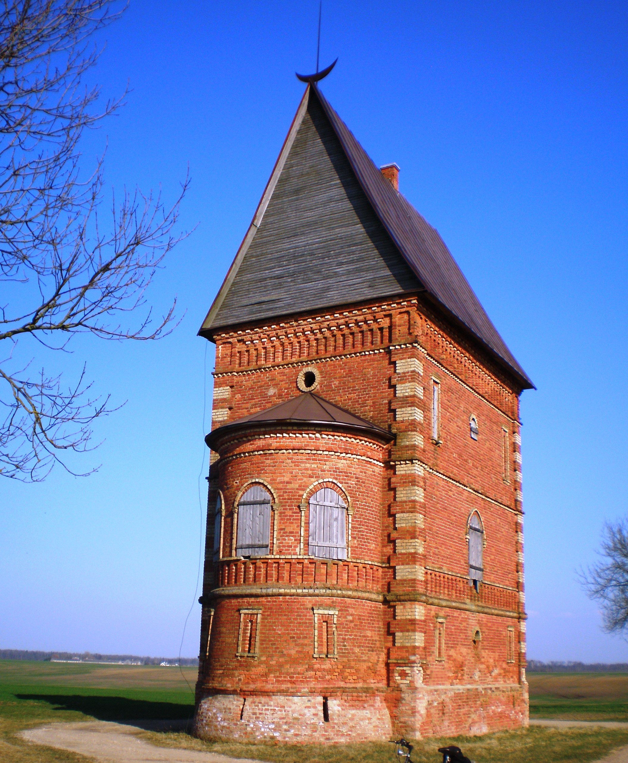 Labūnavos dvaro bokštas, Pelėdnagių sen., Kėdainių raj.